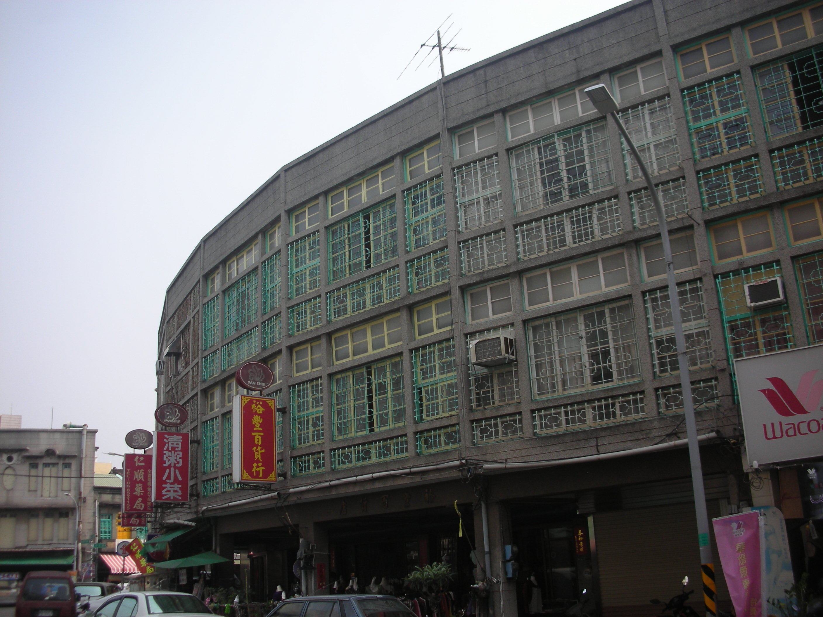 鹽水街景 Yanshui, Tainan